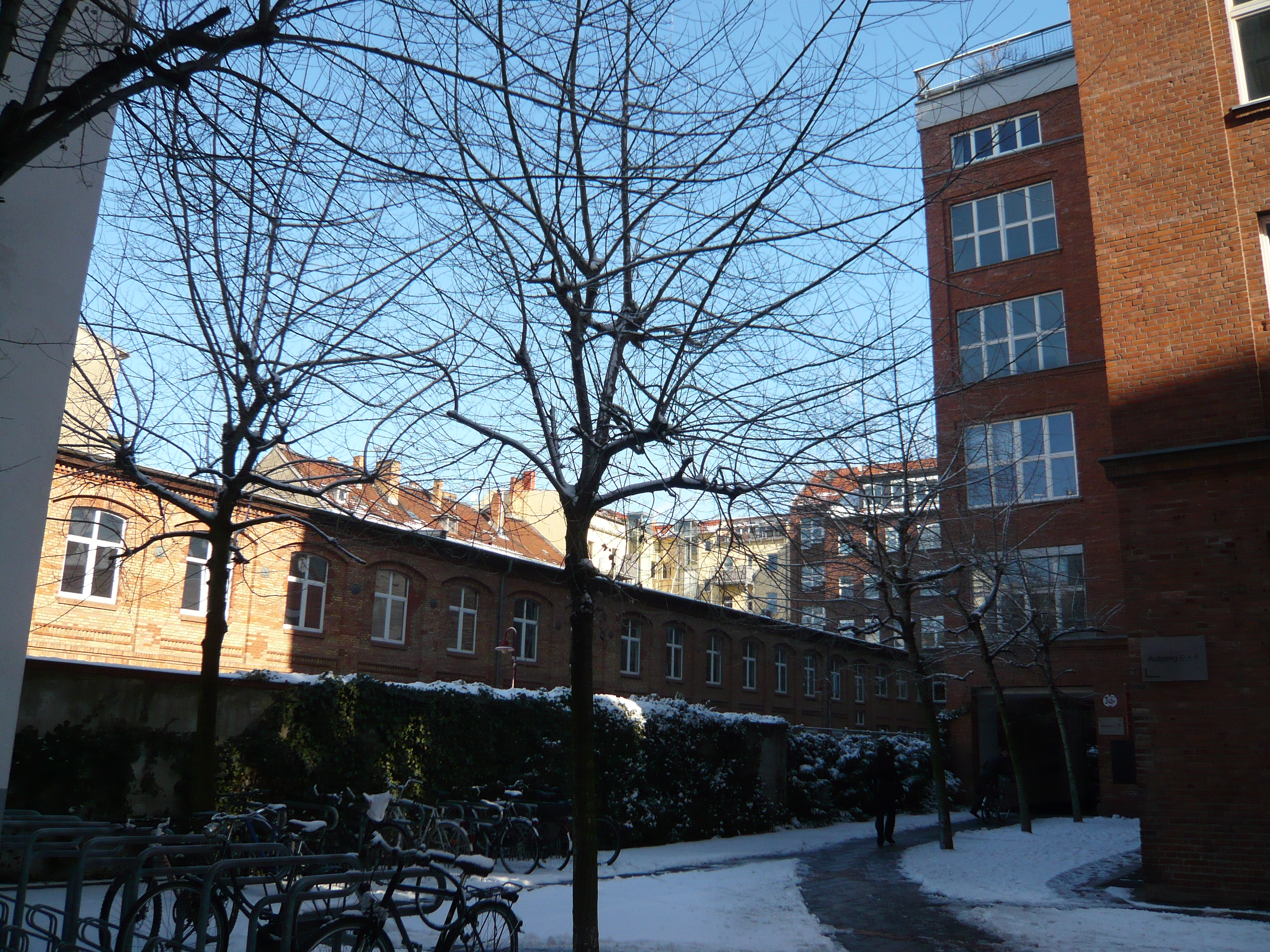 Berlin-Mitte, Oranienburger Vorstadt, Chausseestraße 5-8: Gebäude auf dem Grundstück der 1886 stillgelegten Lokomotivfabrik Borsig (1)